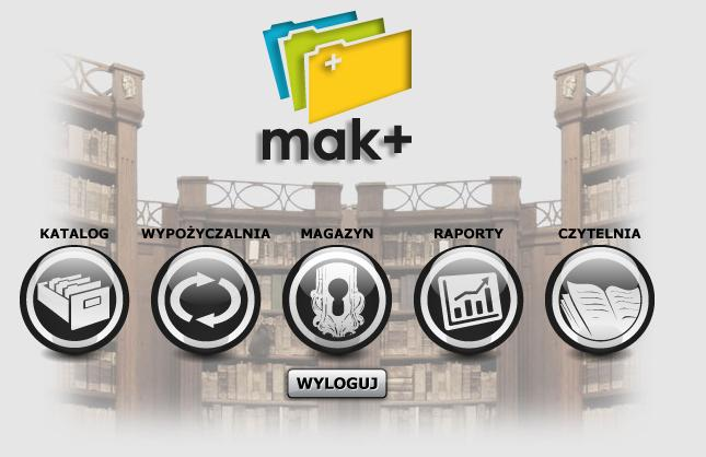 Screen obrazuje widok po zalogowaniu do systemu bibliotecznego MAK+ (Mak Plus)